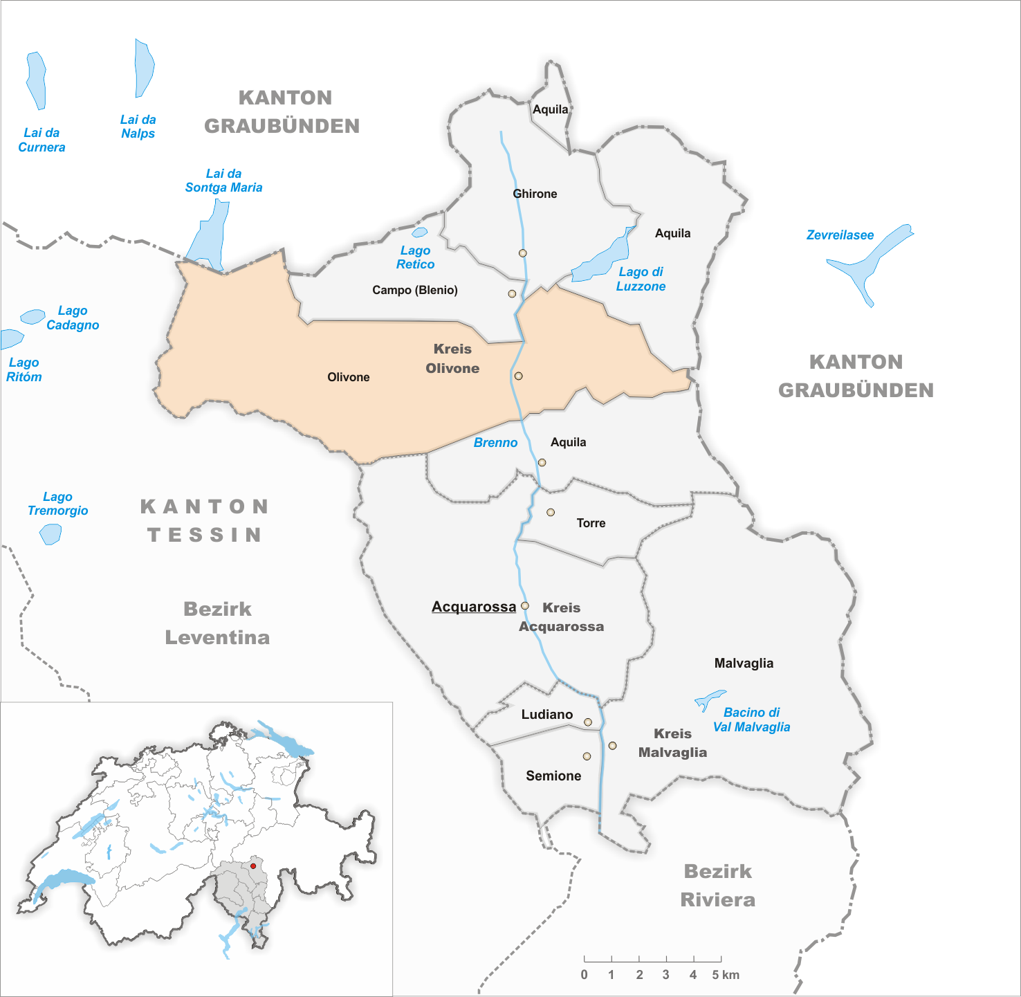 Municipality Olivone